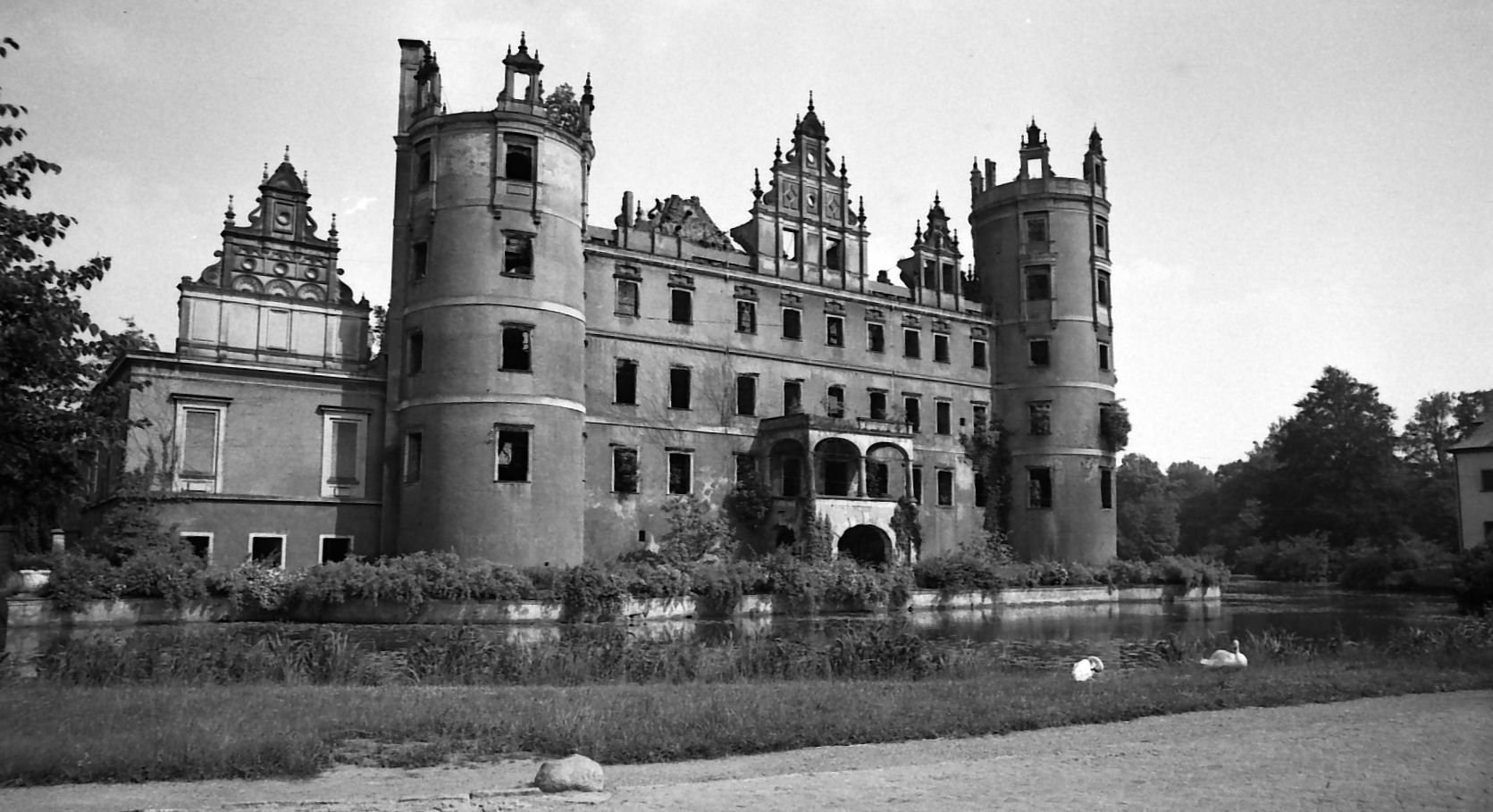 Ruine des Neuen Schlosses Bad Muskau, wahrscheinlich in den 1980er Jahren, Westfassade